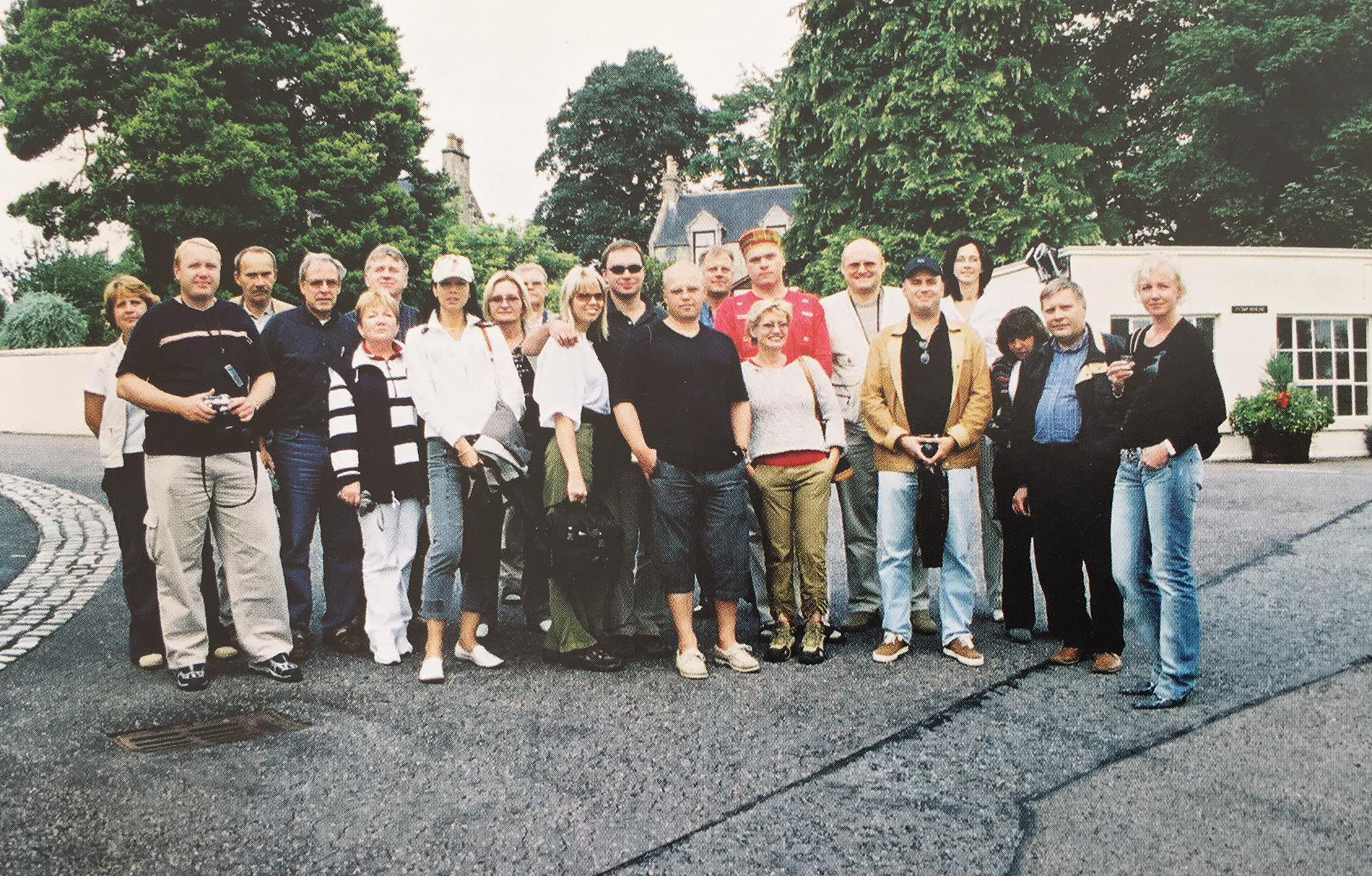 Šoti Klubi reis Šotimaale 1996